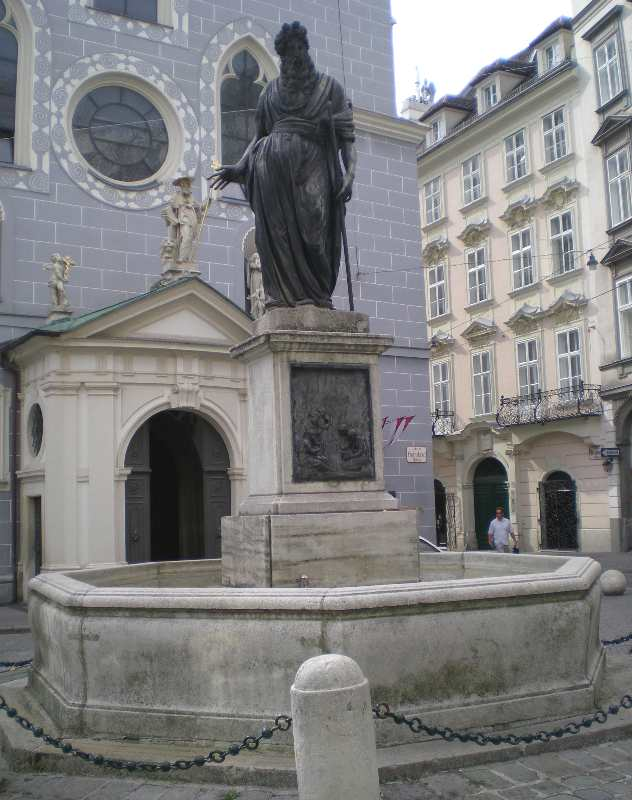 Der Mosesbrunnen auf dem Franziskanerplatz im 1. Wiener Gemeindebezirk